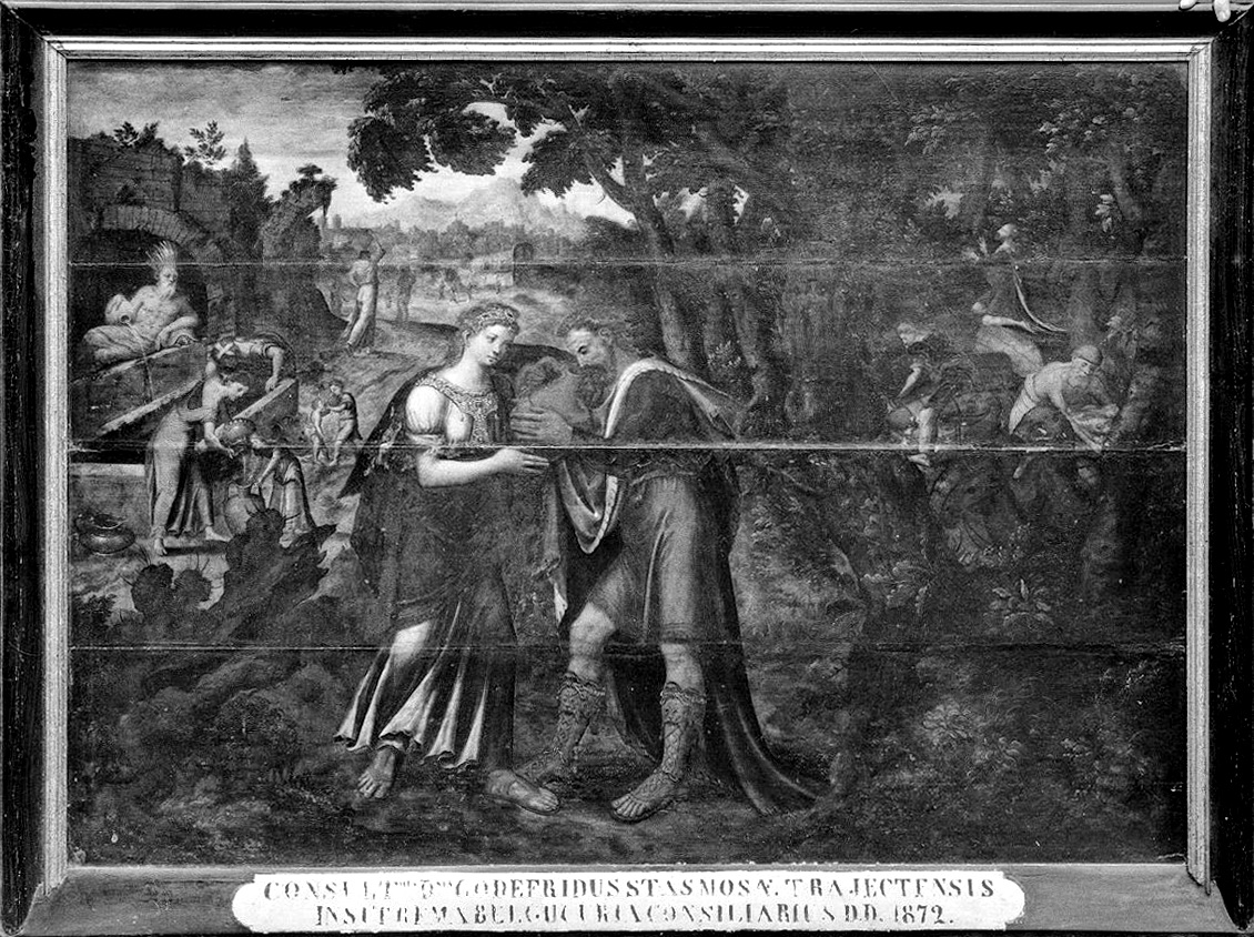 Rooms-Katholieke kerk: schilderij, uit het bezit van Godefroid Stas? (1802-1876), raadsheer van het Hof van Cassatie te Brussel.